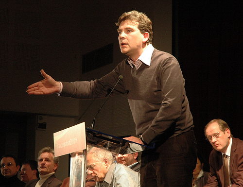 Arnaud Montebourg lors d'un meeting à Blanzy pour la campagne des élections régionales 2010